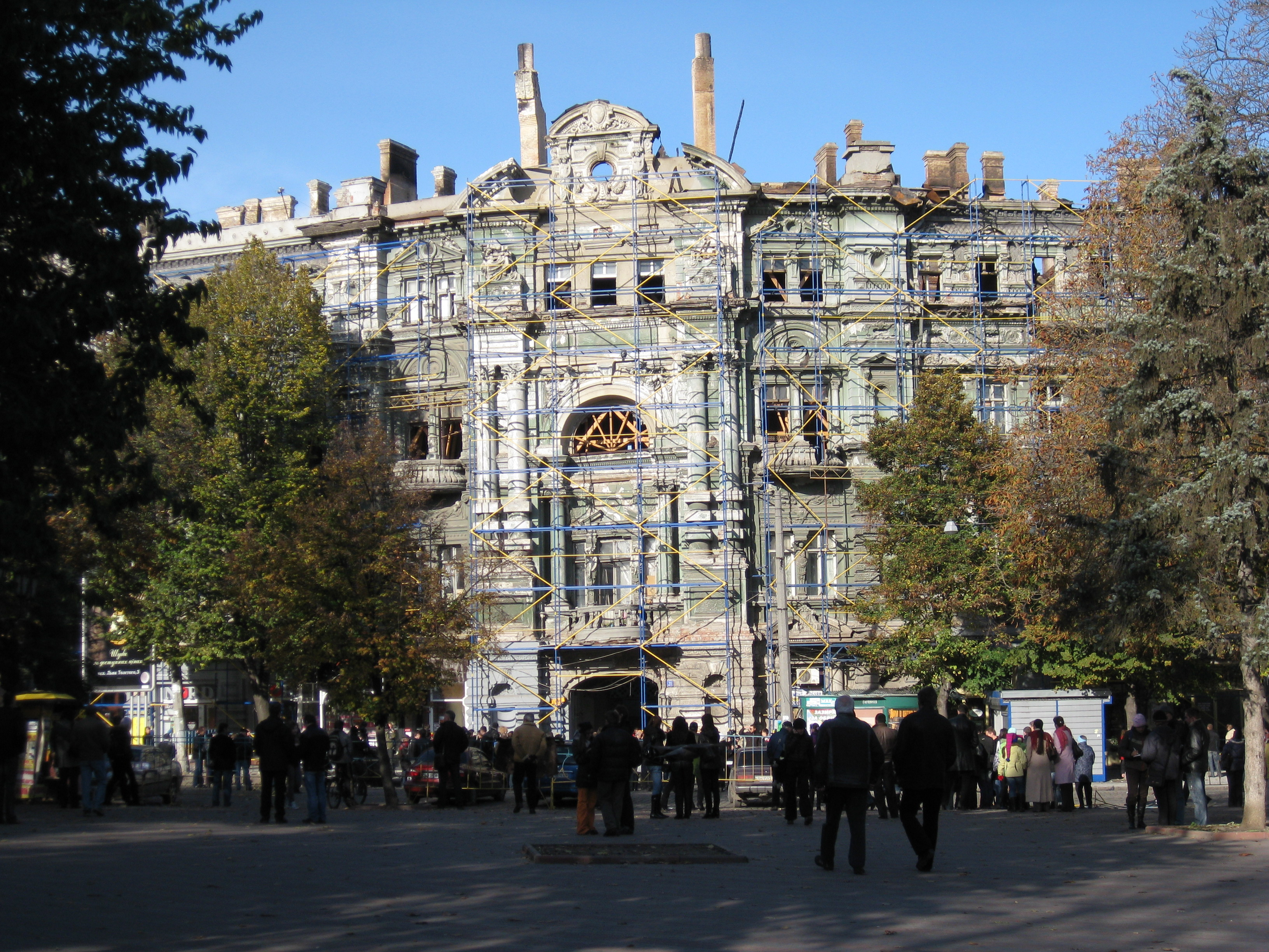 Будинок (Руссова), Одеса, Садова вул., 21